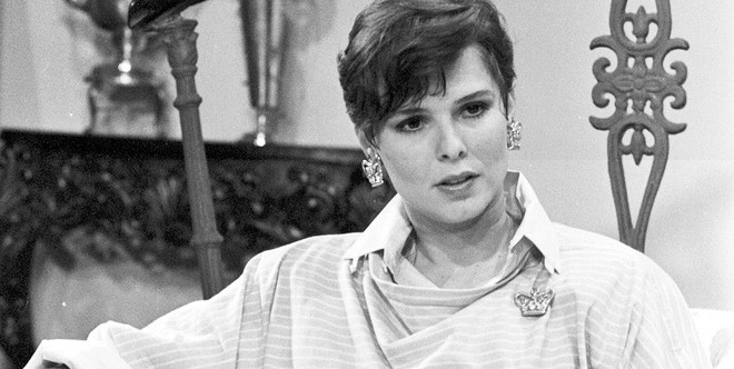 Louise Cardoso como Dani